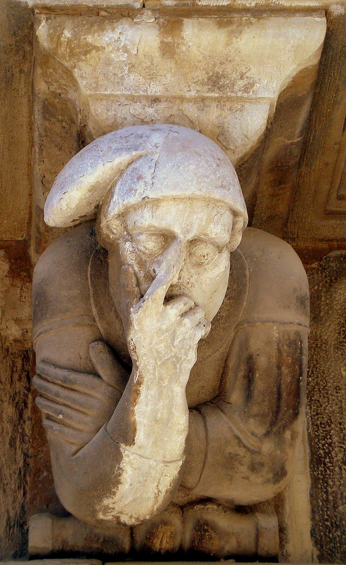 Casa de la Vila (Cervera) Object location41° 39′ 56.01″ N, 1° 16′ 15.44″ E